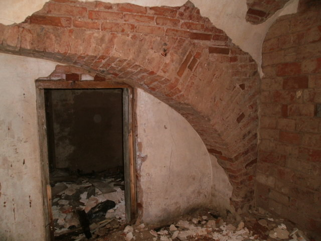 Mõisahoone võlvitud keldrid.